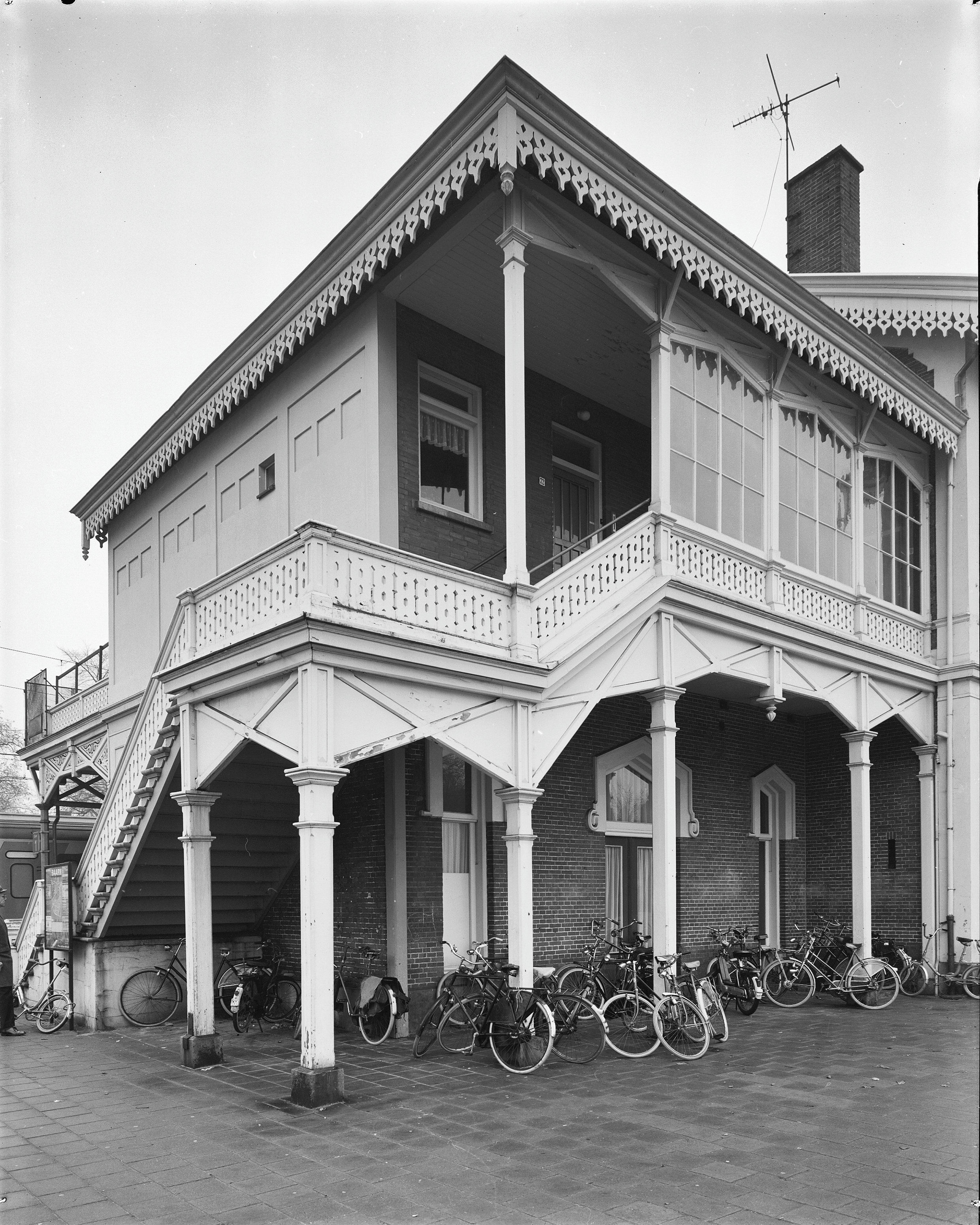 Station Nederlandse Spoorwegen: Voor- en linkerzijgevel station Baarn